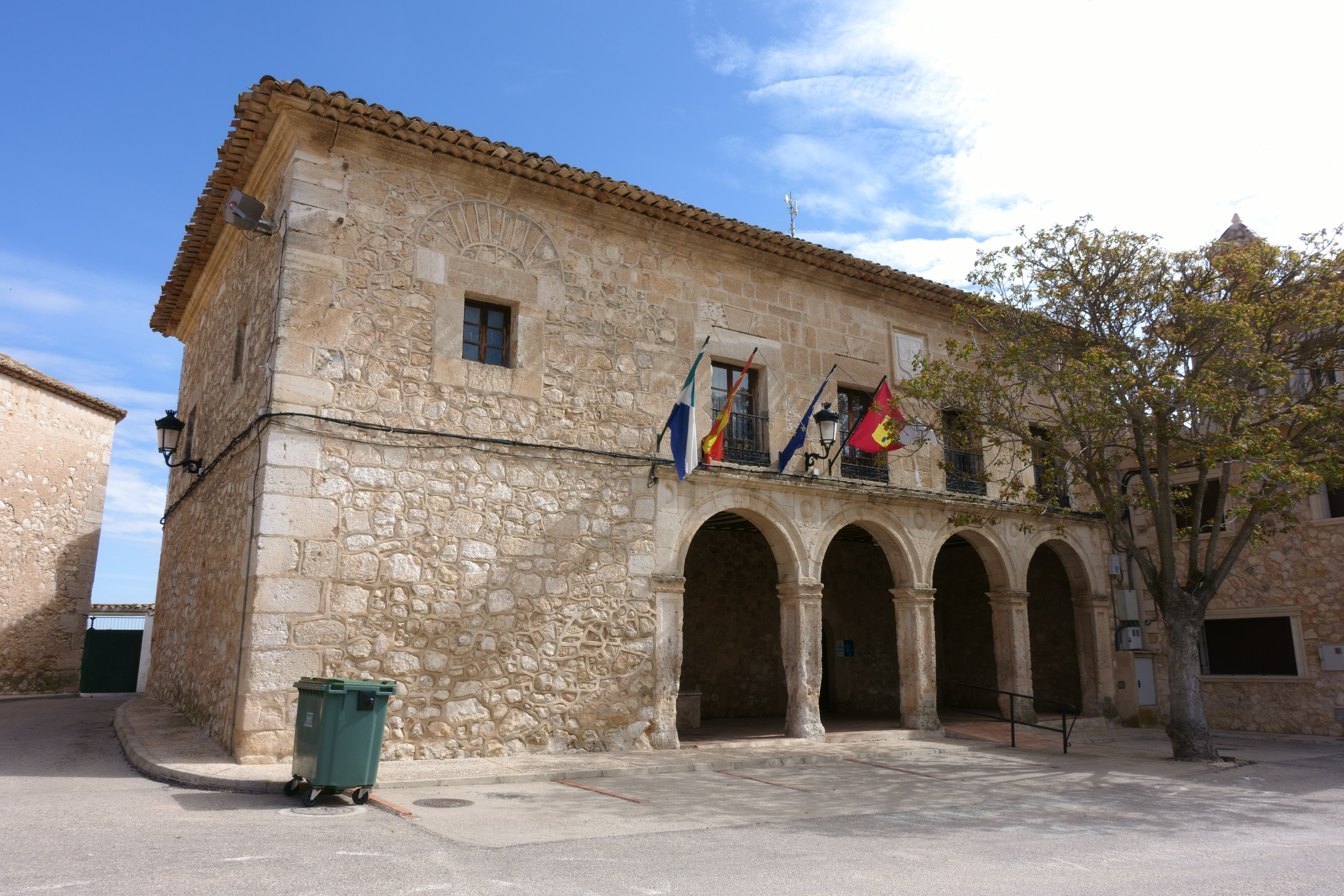 Casa consistorial de La Alberca de Záncara (Cuenca, España).